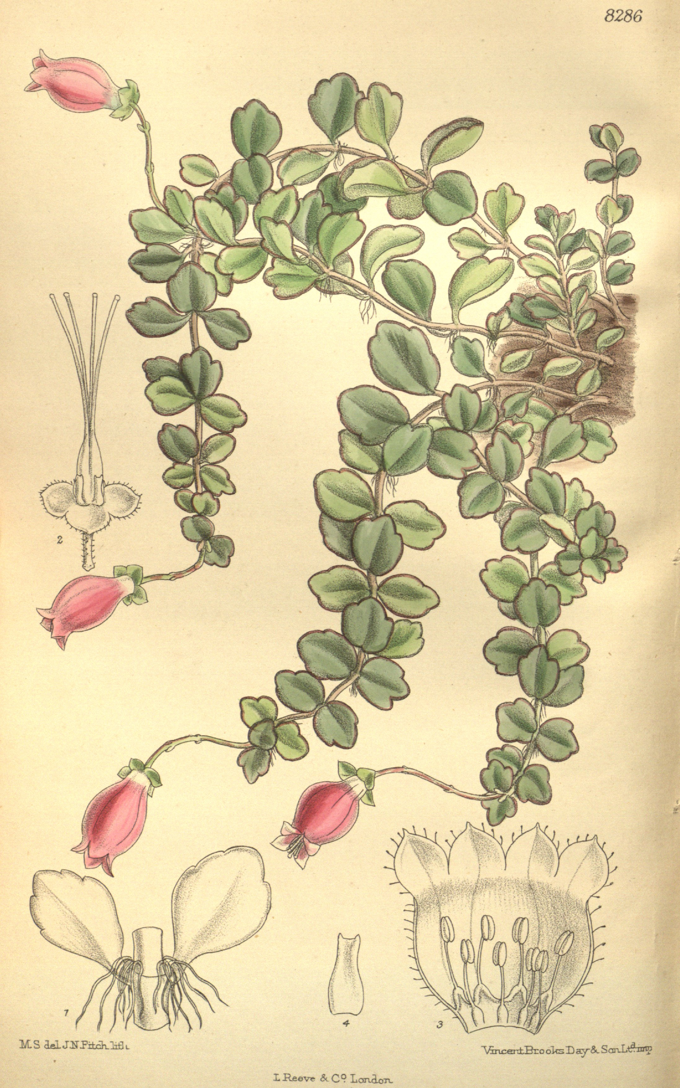 Kitchingia uniflora (= Kalanchoe uniflora), Crassulaceae